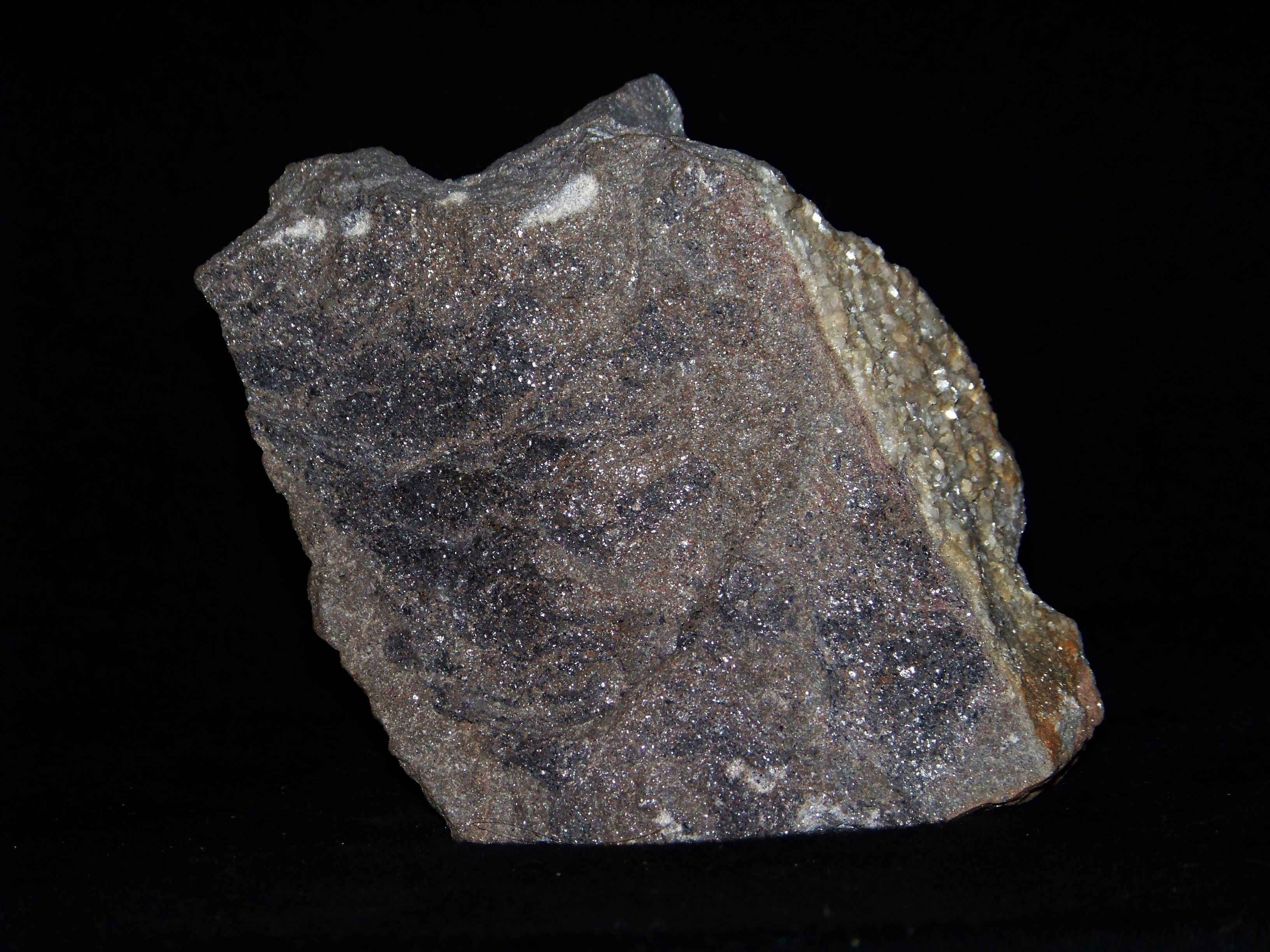 mułowiec z ankerytem, KWK Pstrowski, Zabrze, Górny Śląsk